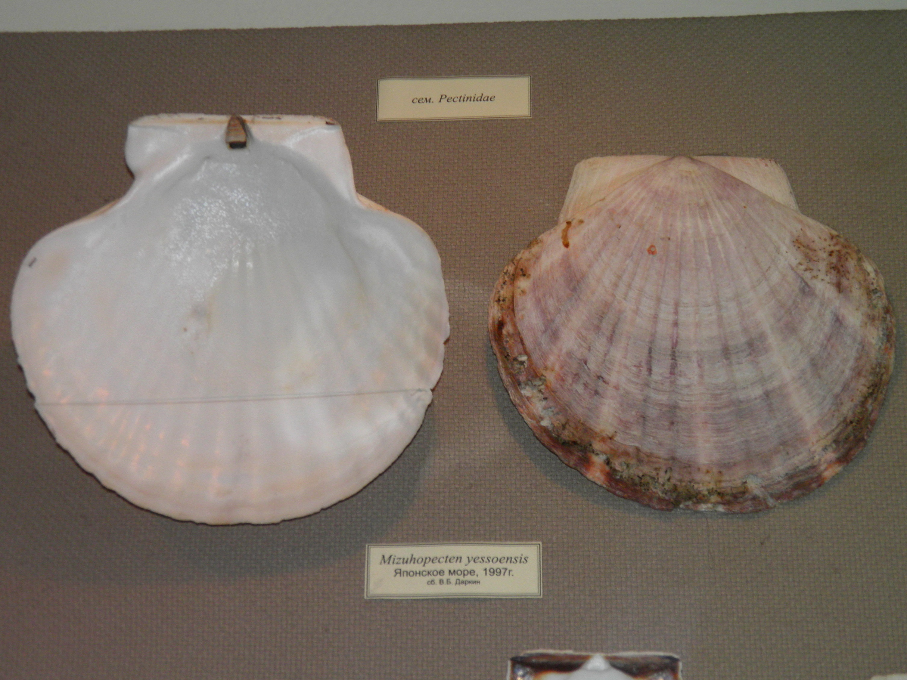 Гребешок приморский (Mizuhopecten yessoensis) в Научном музее ДВФУ (г. Владивосток)